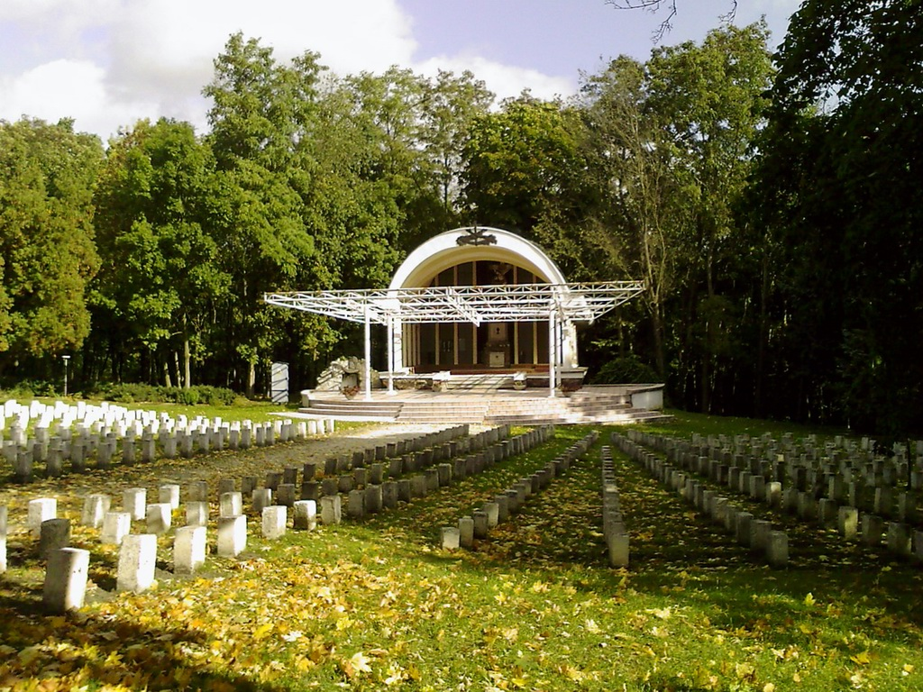 Pakość - XVII-wieczna kalwaria fundacji Działyńskich